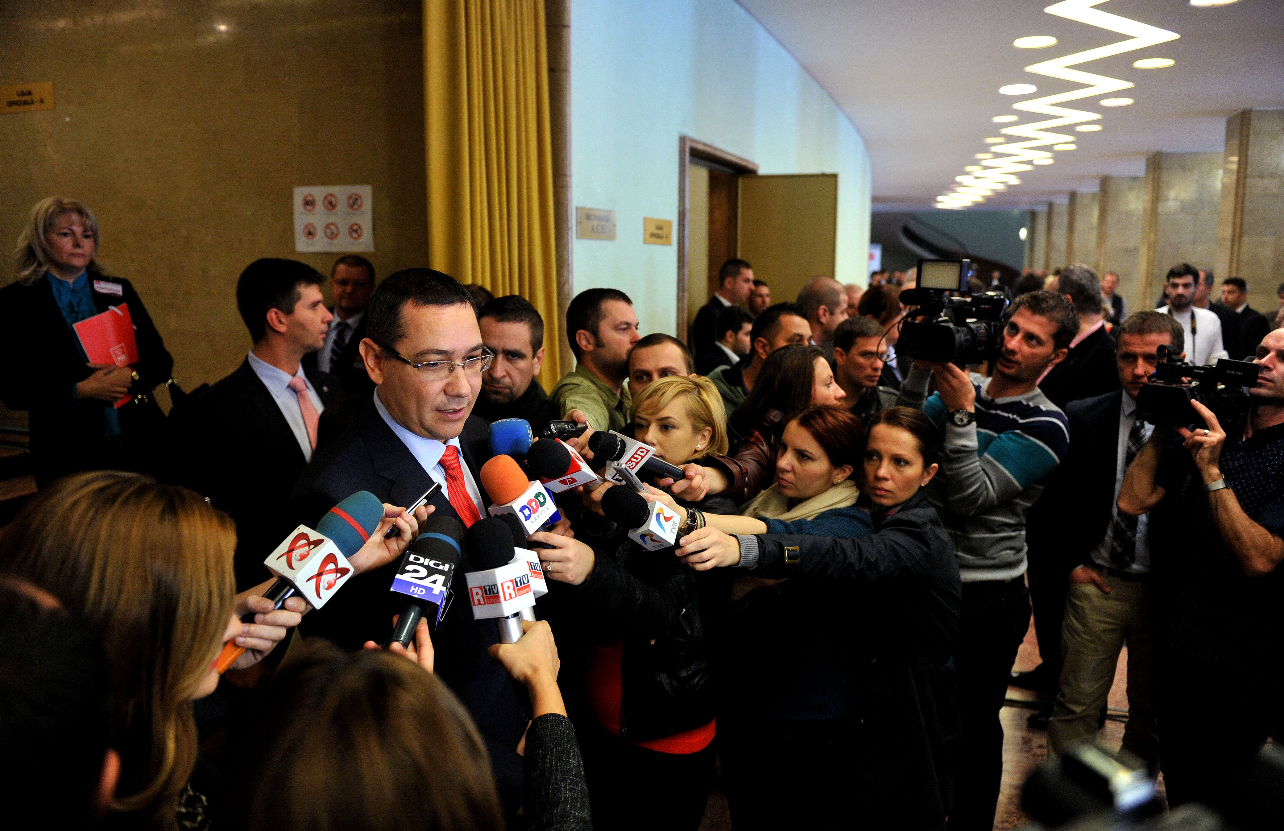 Victor Ponta la Consiliul National al PSD